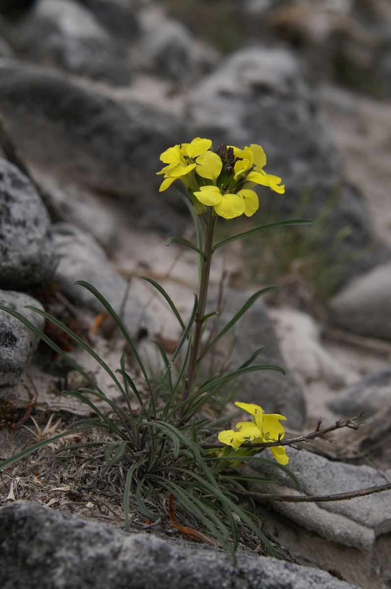 Gozdni šebenik na Polhograjski Grmadi.